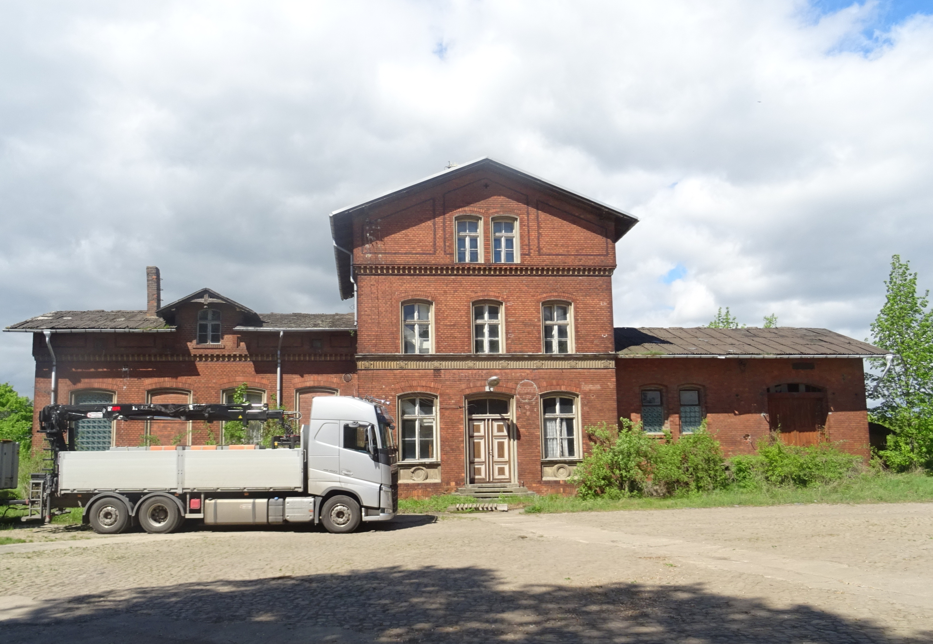 ehemaliger Bahnhof Neugattersleben, Kulturdenkmal, Empfangsgebäude, Vorplatz